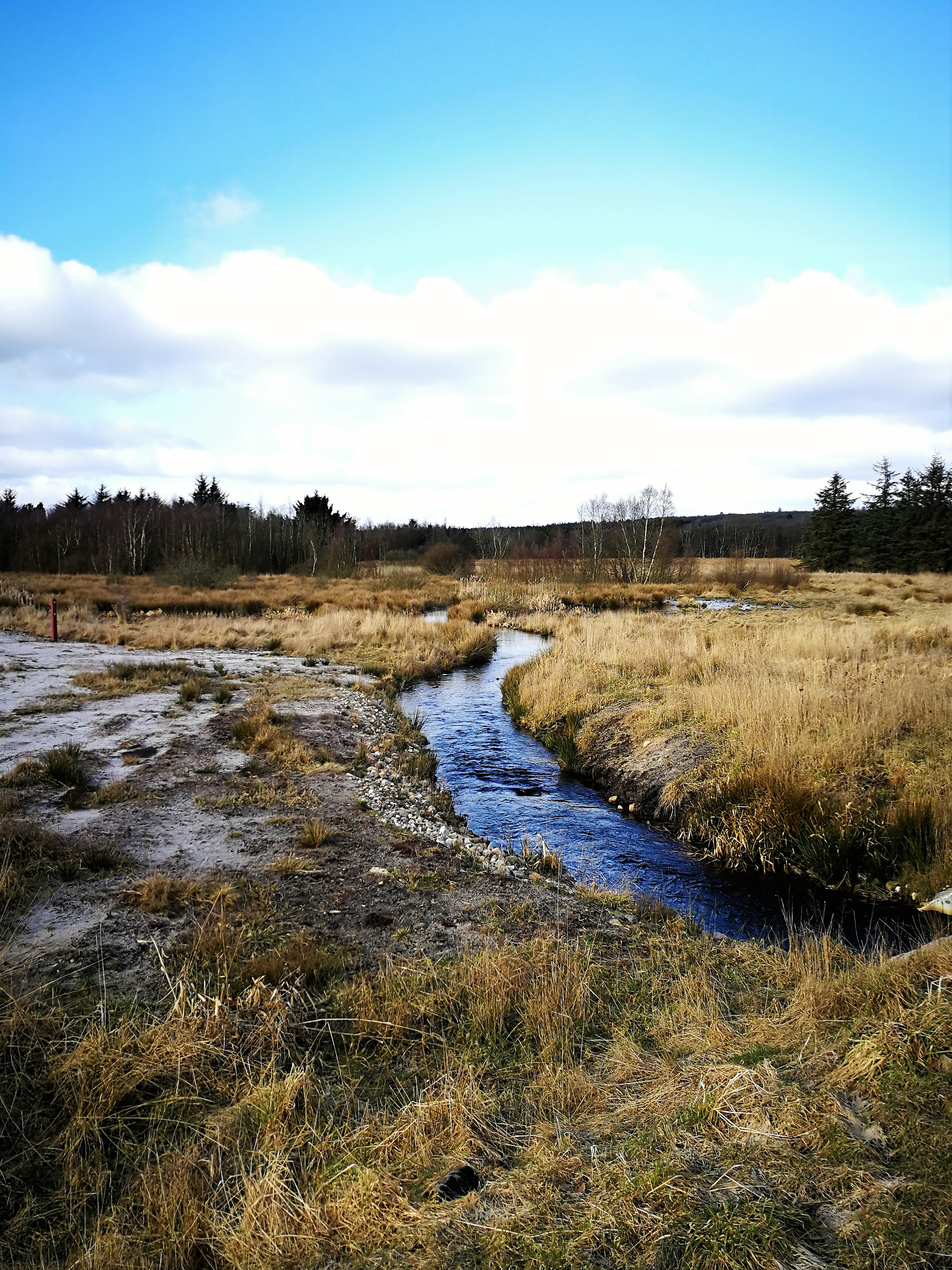 Skygge Å ved udløbet fra Bølling Sø